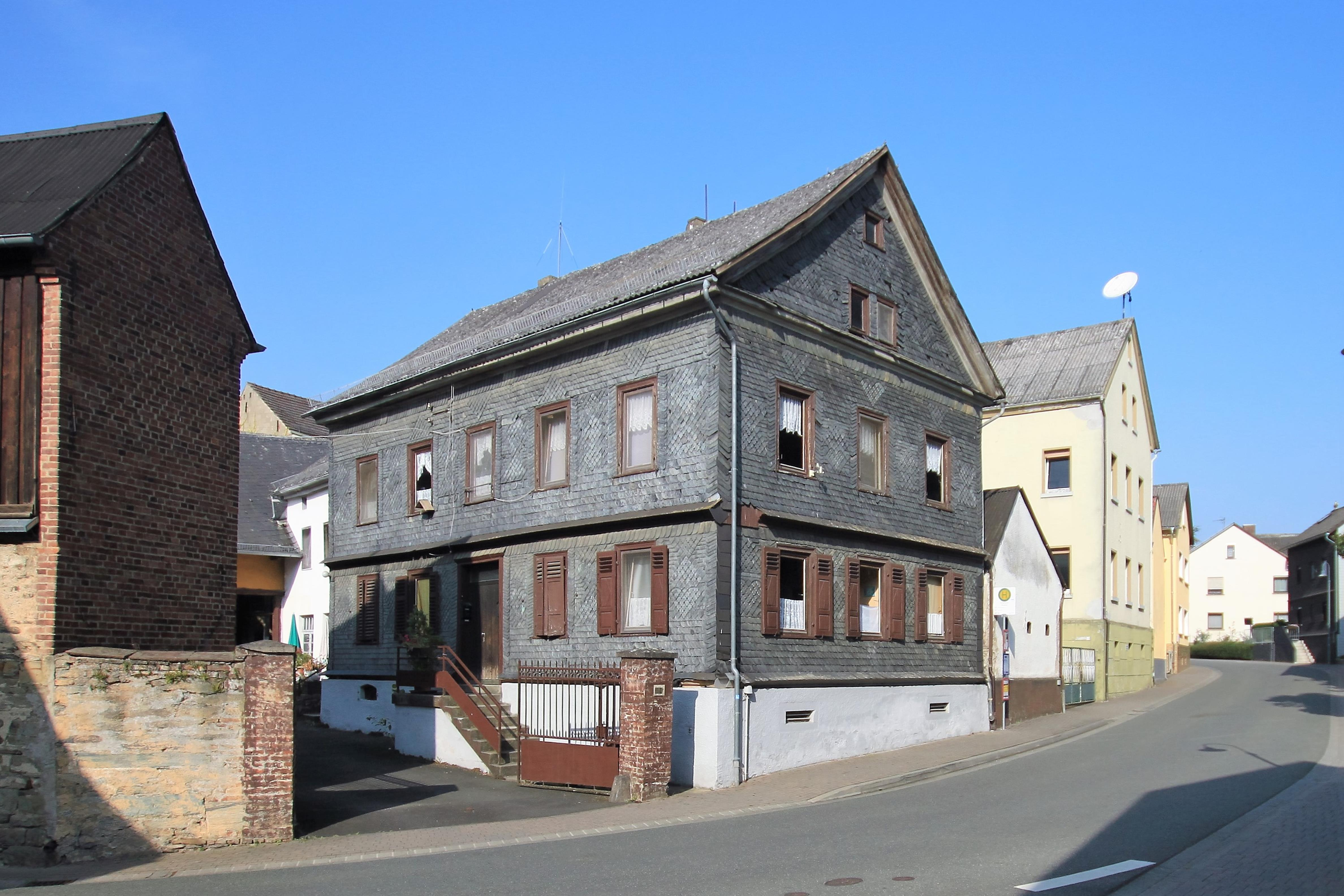 Berghausen - Wohnhaus, Hauptstraße 11